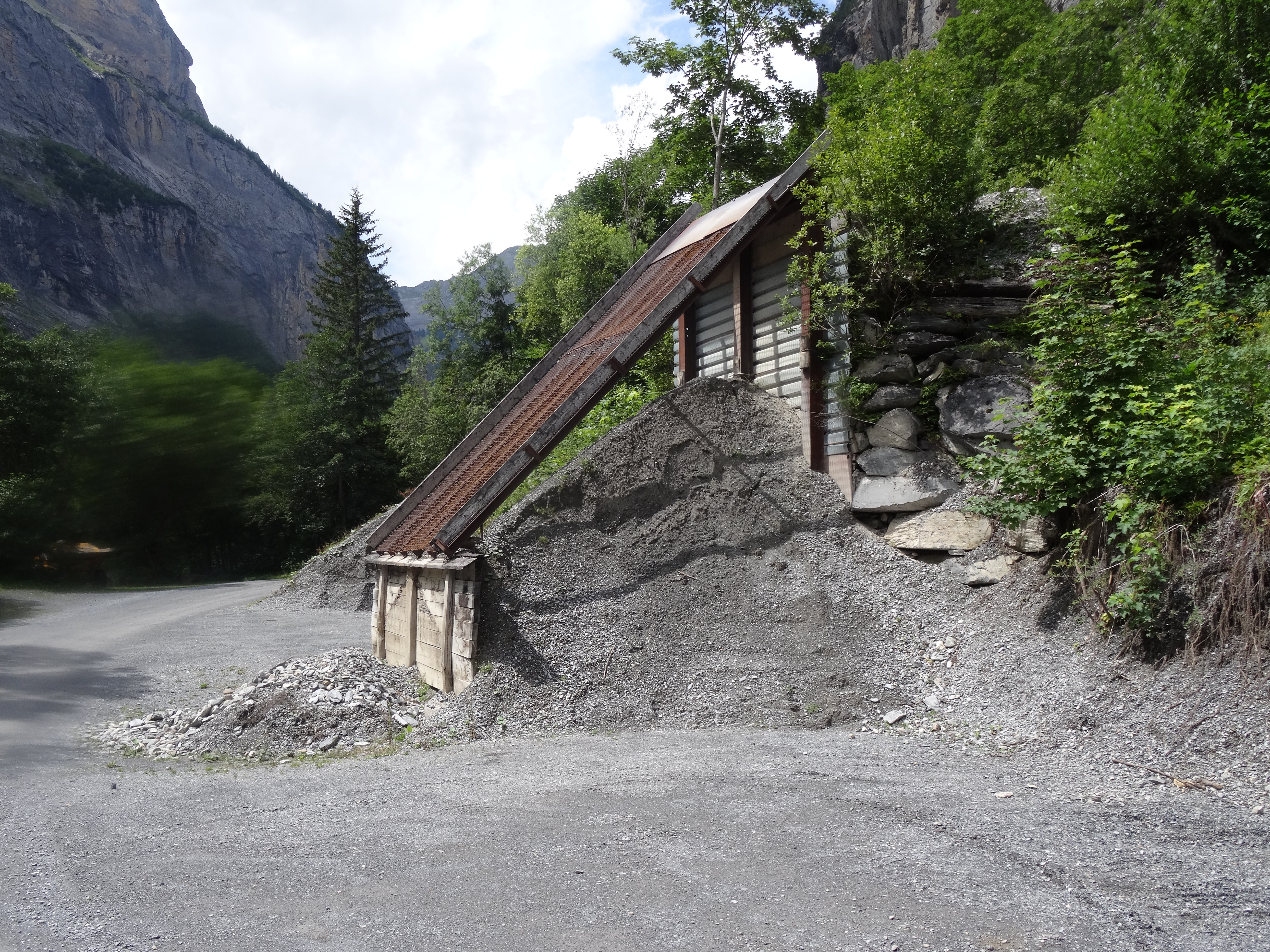 Kiesschütte; einfache Trennanlage zur Gewinnung von Kies im Gasterntal